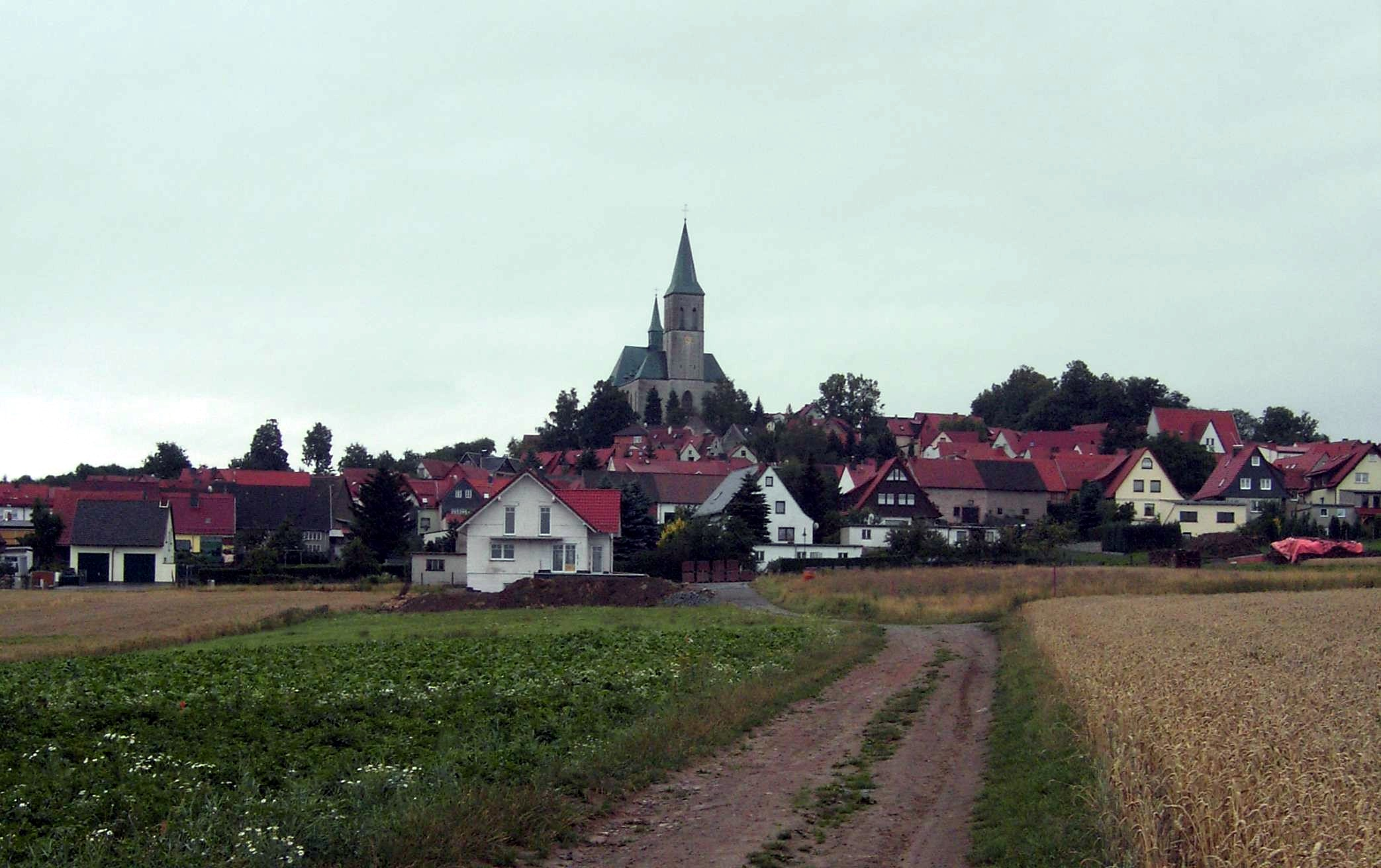 Eichsfelder Dom, Katholische Kirche St. Alban in Effelder, Eichsfeld, Thüringen, Deutschland